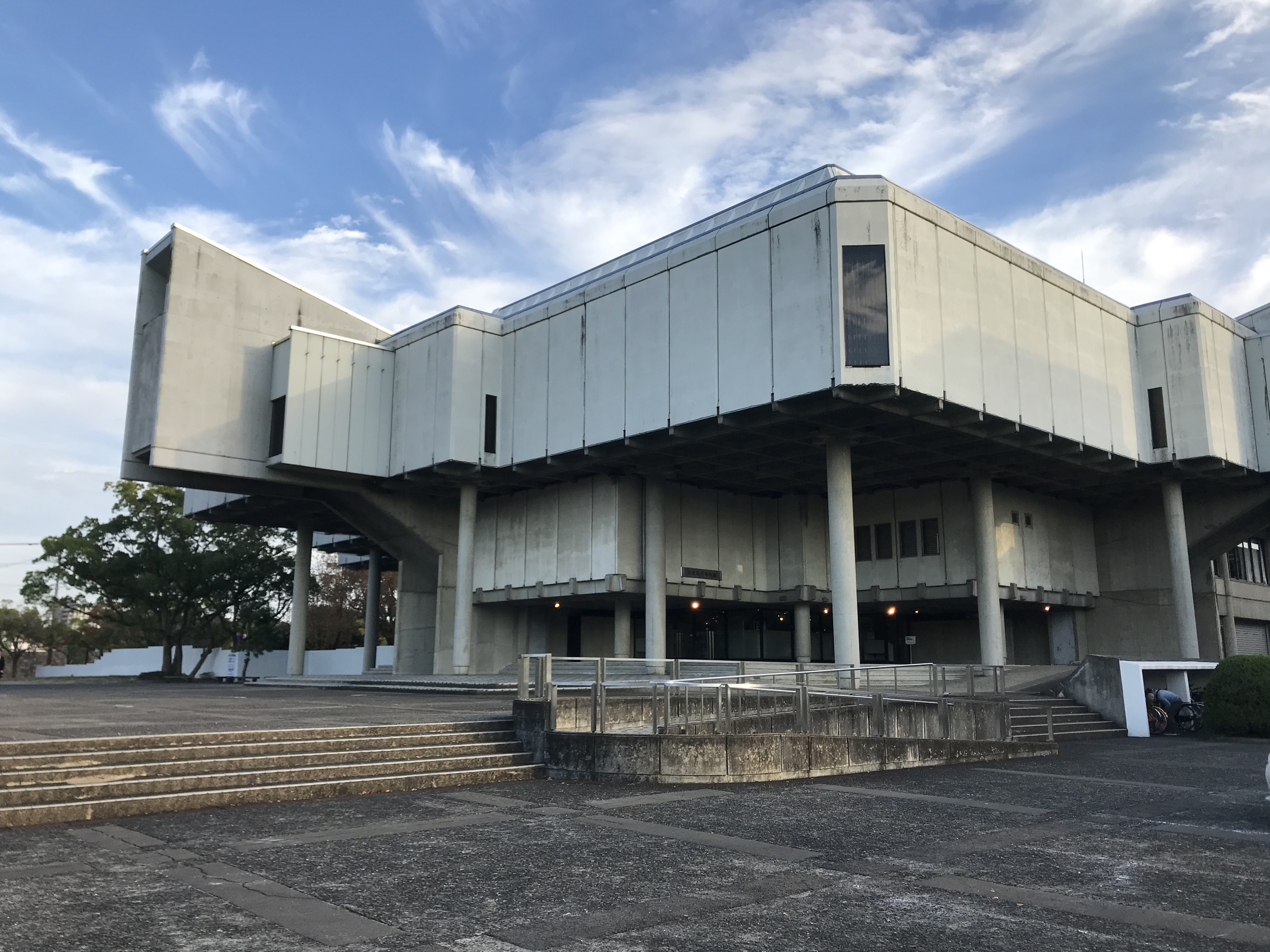 佐賀県立博物館